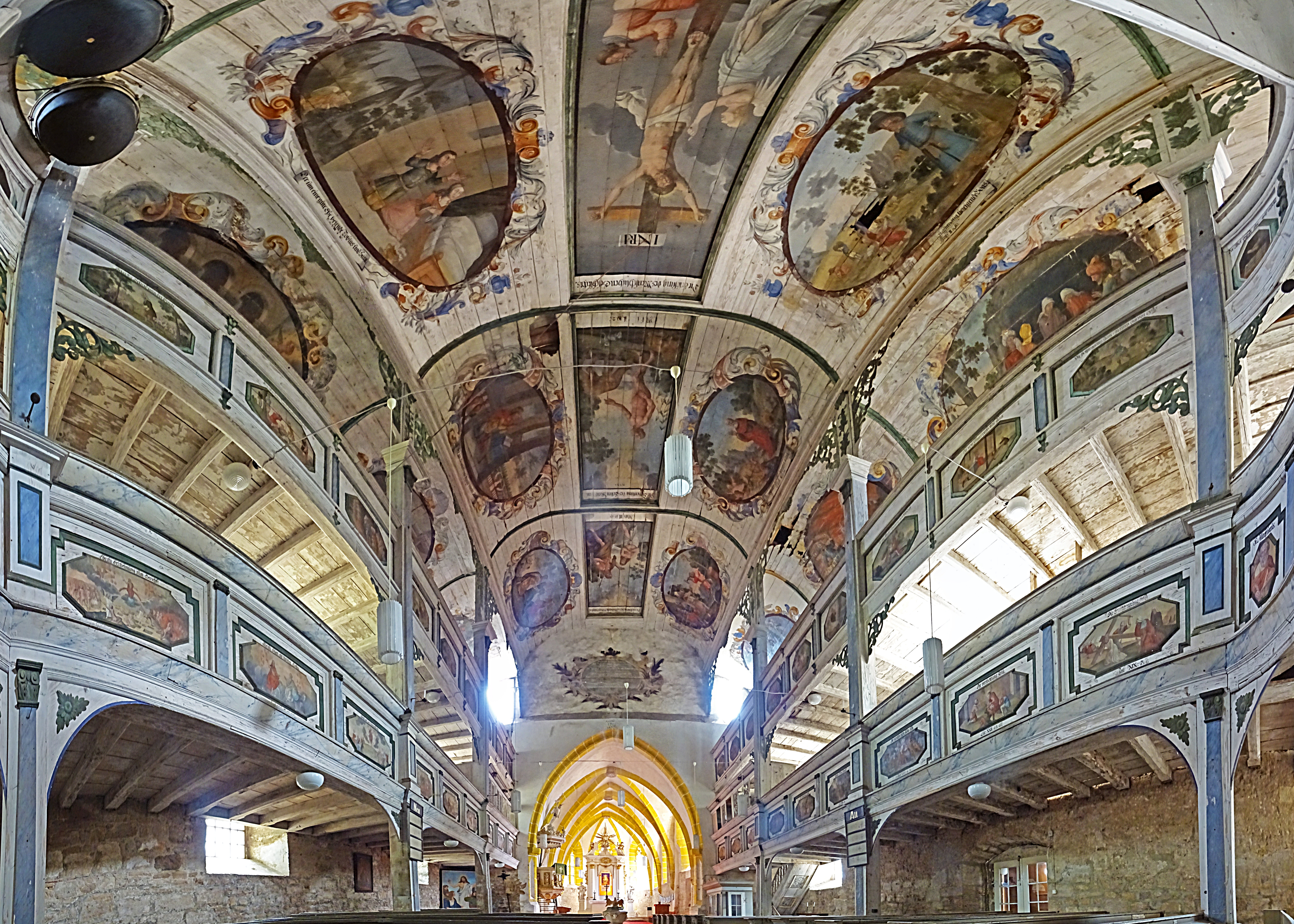 Panorama Blick von Westen ins Kirchenschiff der St. Petri-Pauli-Kirche (Günstedt). Ausmalung des Kircheninnenraumes und der Decken und Emporen mit biblischen Darstellungen des alten und neuen Testaments von 1728.